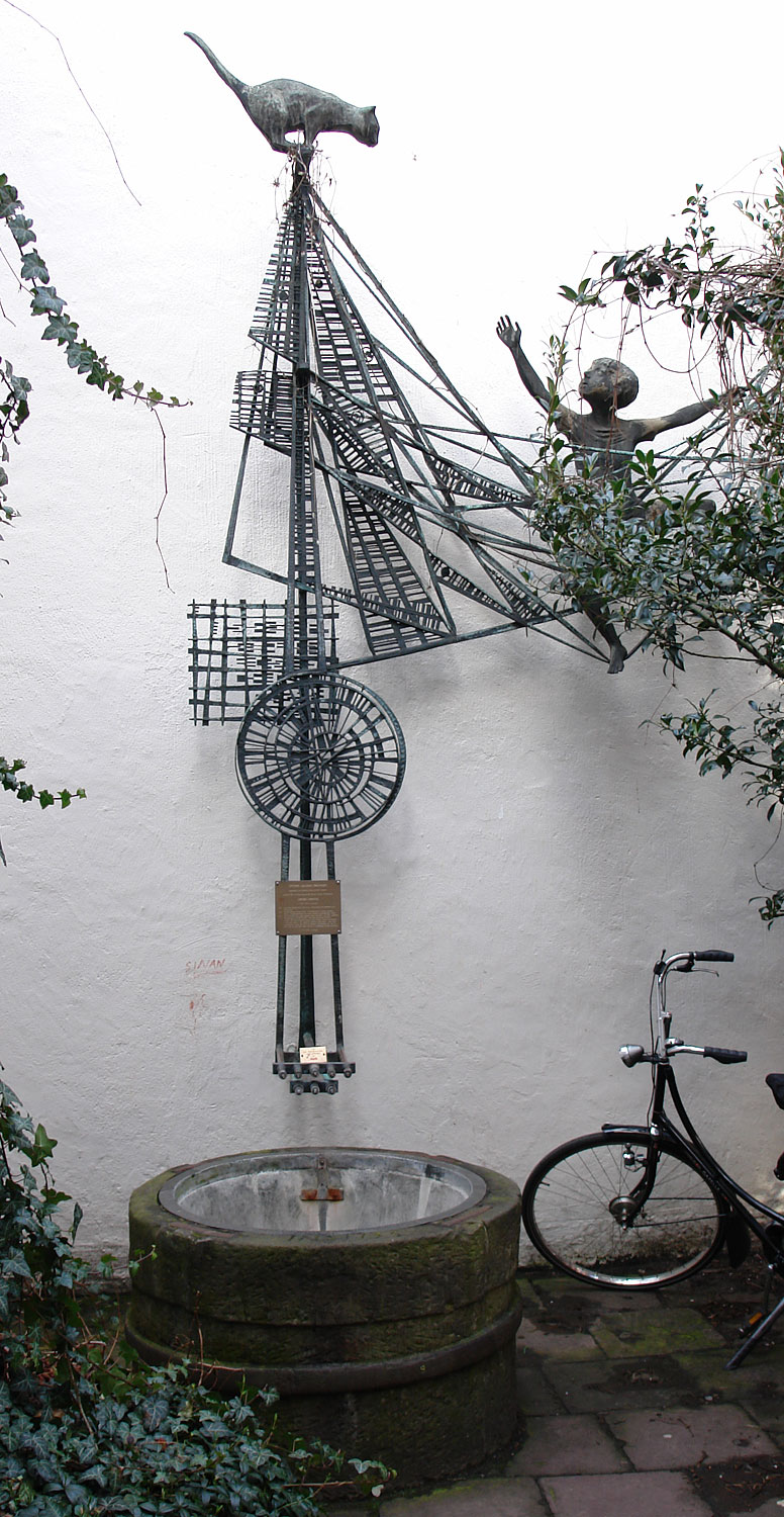 Schnoor Bremen: Ottjen-Alldag-Brunnen. Herstellung: 1963. Bildhauer: Klaus Homfeld